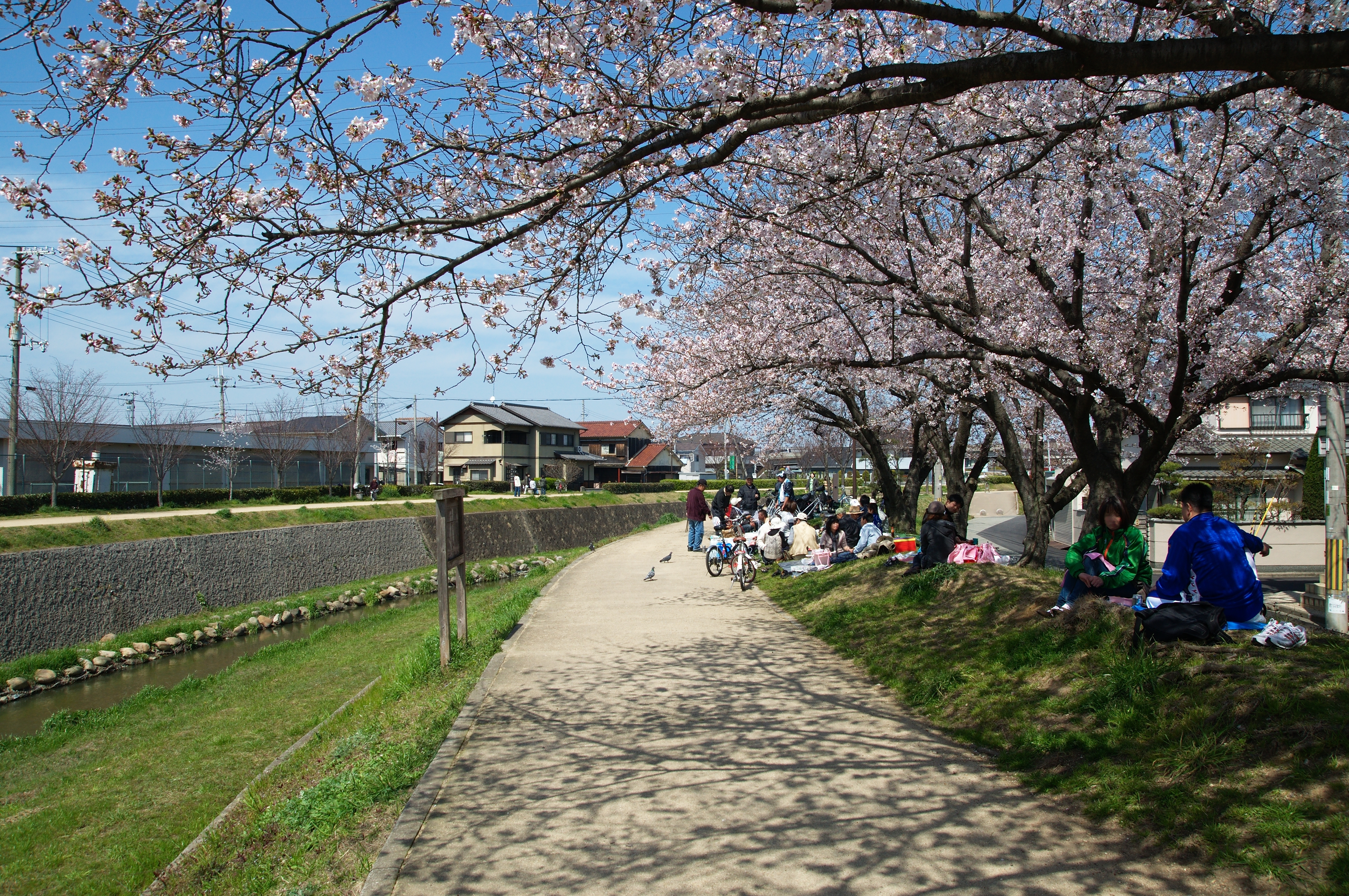 播磨町喜瀬川